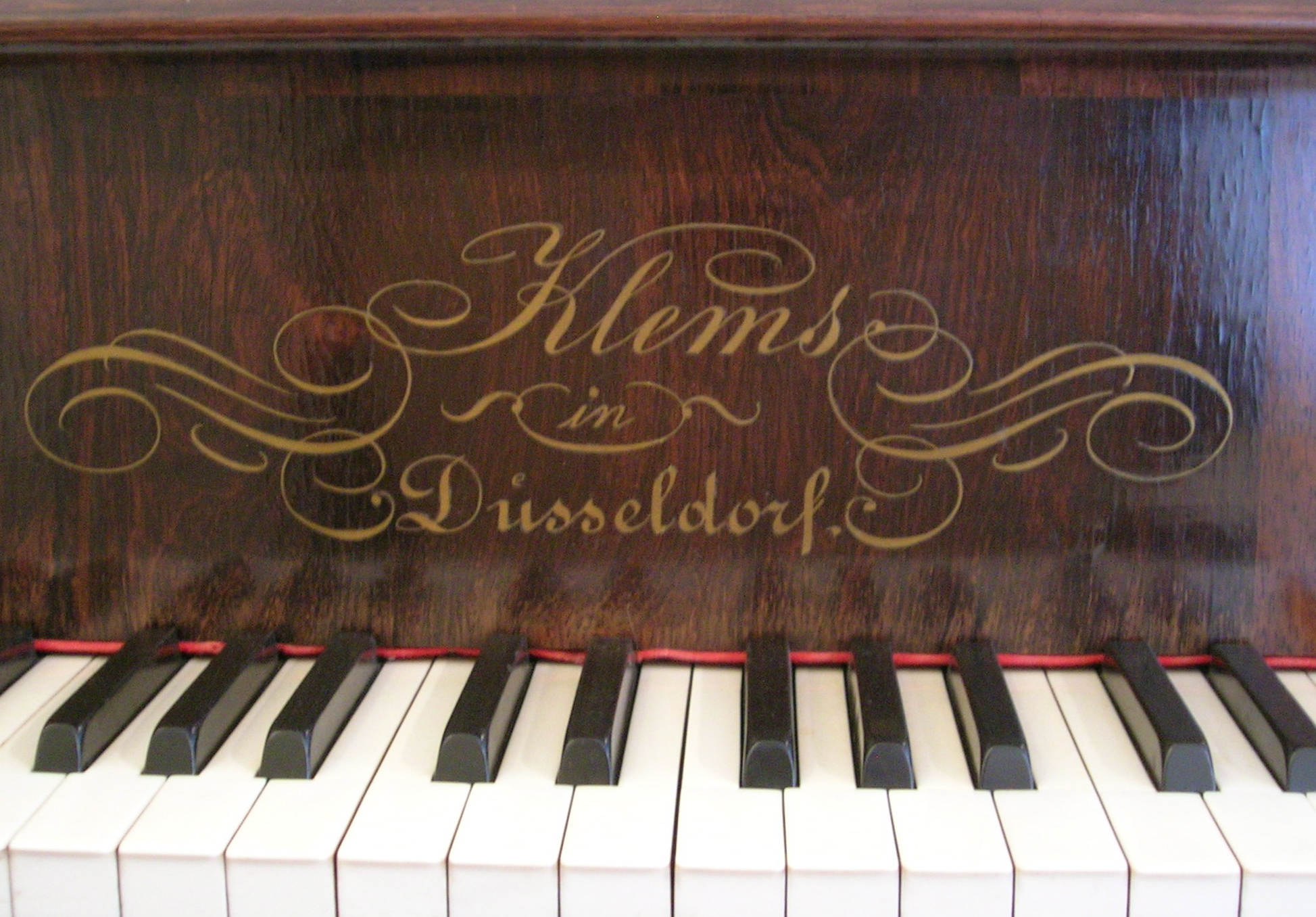 Nameplate for a Klems concert grand, 1857 (Heinrich-Heine-Institut, Düsseldorf, Germany)